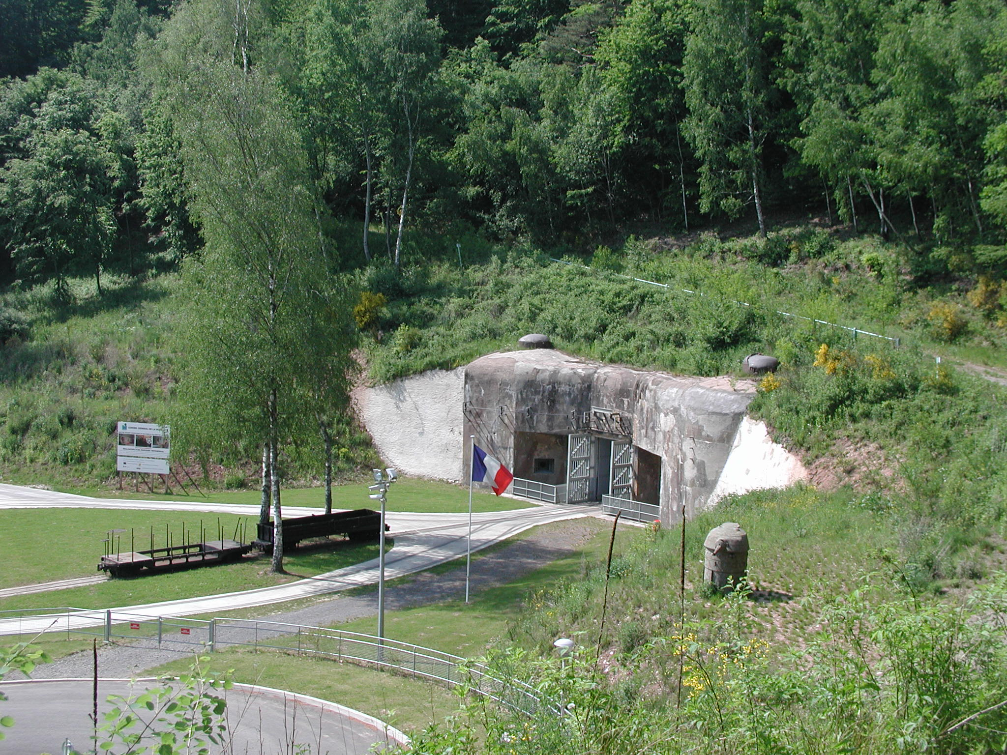 Simserhof